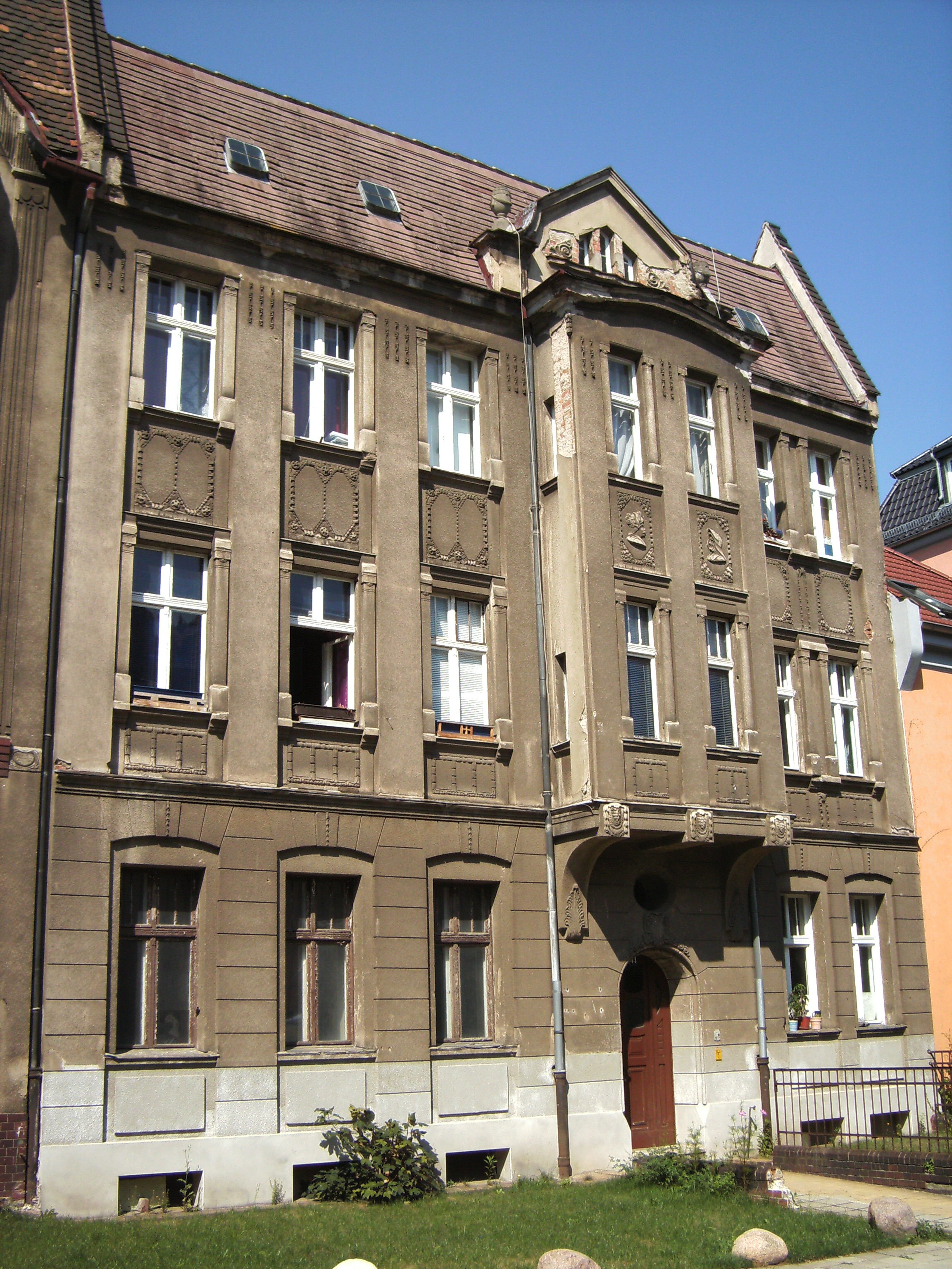 Wernerstr. 44